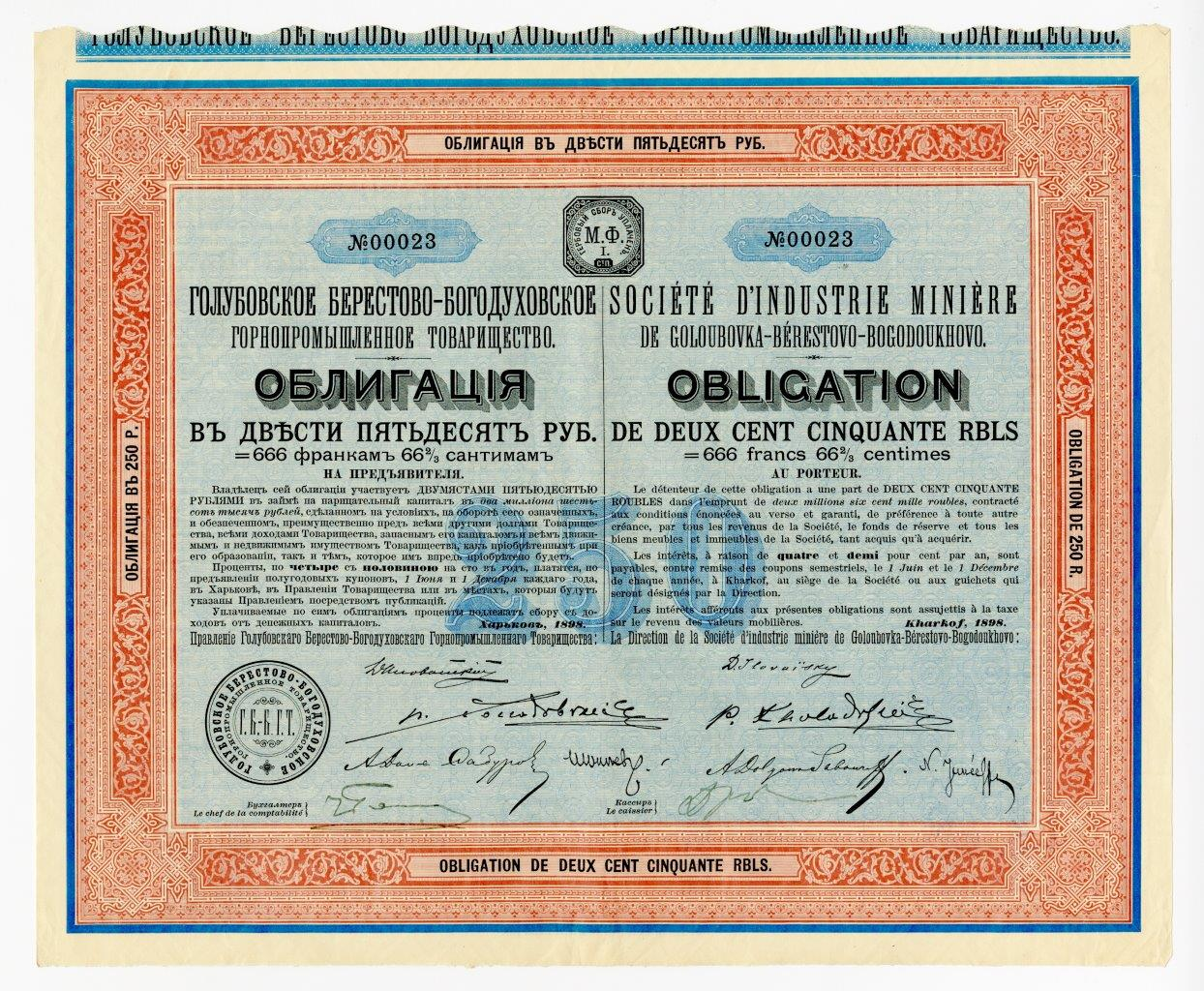 4,5 % Облигация в 250 руб. на предъявителя Голубовского Берестово-Богодуховского горнопромышленного товарищества. Г. Харьков, 1898 г.